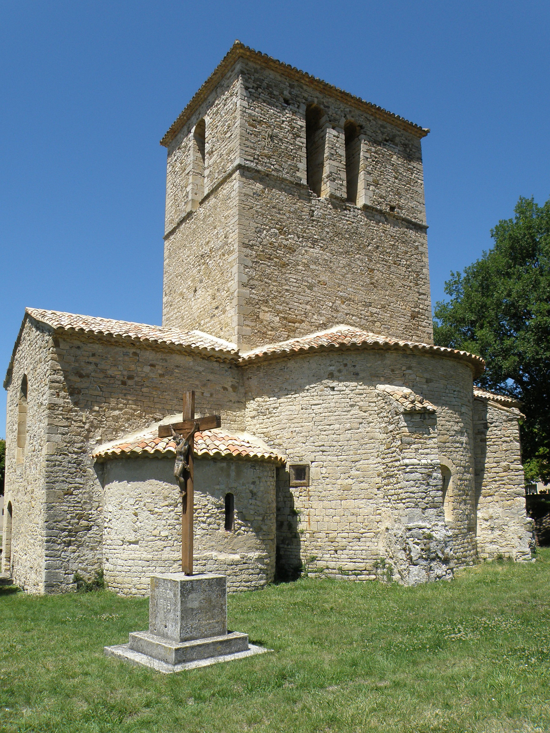 Sainte-Jalle (Drôme, France). Église paroissiale Notre-Dame de Beauver. Chevet.